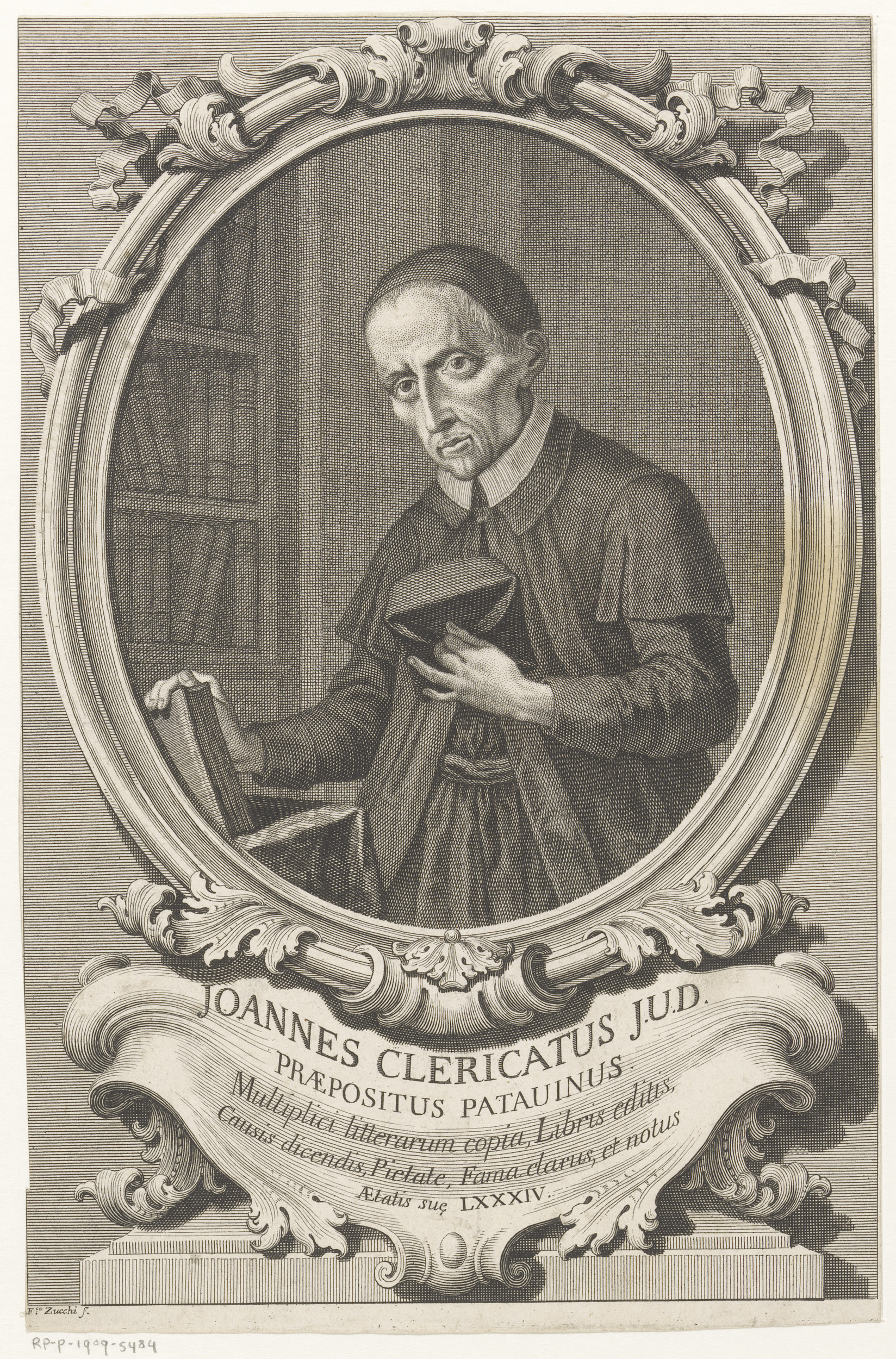 IdentificatieTitel(s): Portret van religieuze Giovanni Maria ChiericatoObjecttype: prent Objectnummer: RP-P-1909-5484Opschriften / Merken: verzamelaarsmerk, verso, gestempeld: Lugt 2228VervaardigingVervaardiger: prentmaker: Francesco Zucchi (vermeld op object)Plaats vervaardiging: ItaliëDatering: 1702 - 1764Fysieke kenmerken: gravureMateriaal: papier Techniek: graveren (drukprocedé)Afmetingen: plaatrand: h 273 mm × b 178 mmOnderwerpWat: historical personsWie: Giovanni Maria ChiericatoVerwerving en rechtenVerwerving: aankoop 1905Copyright: Publiek domein